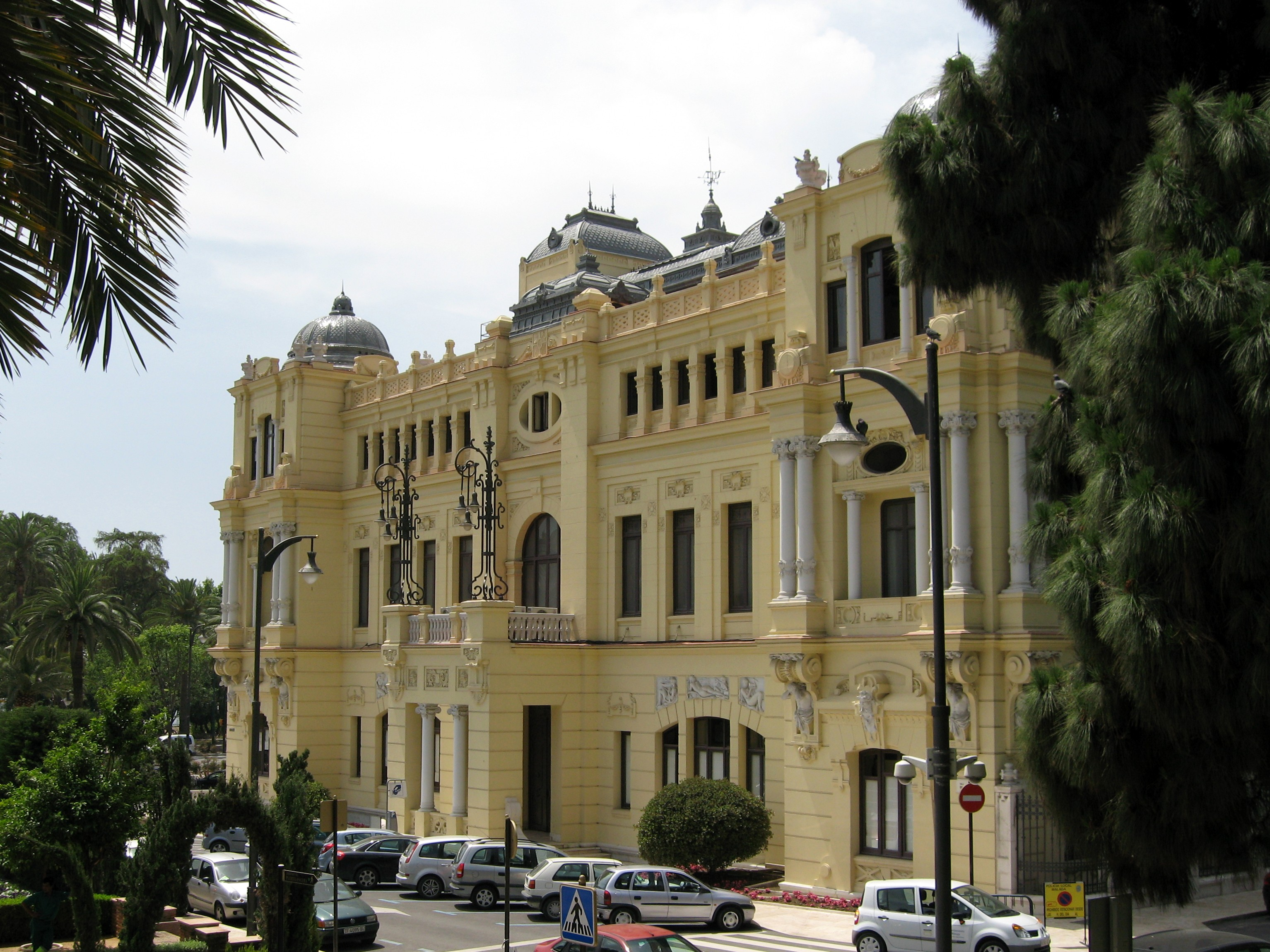 Rathaus von Málaga (Ayuntamiento de Málaga), Andalusien, Spanien